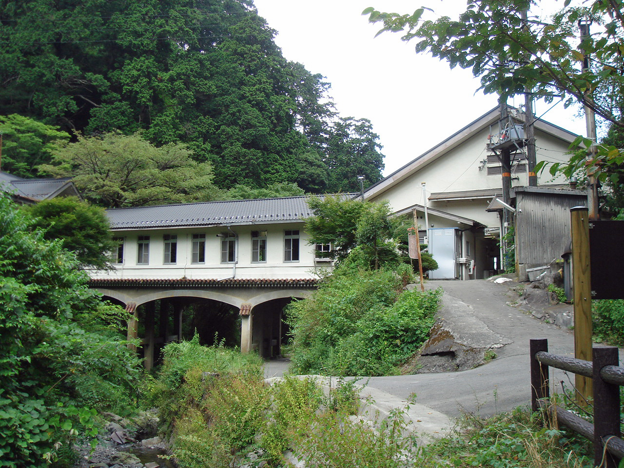 南海高野線極楽橋駅